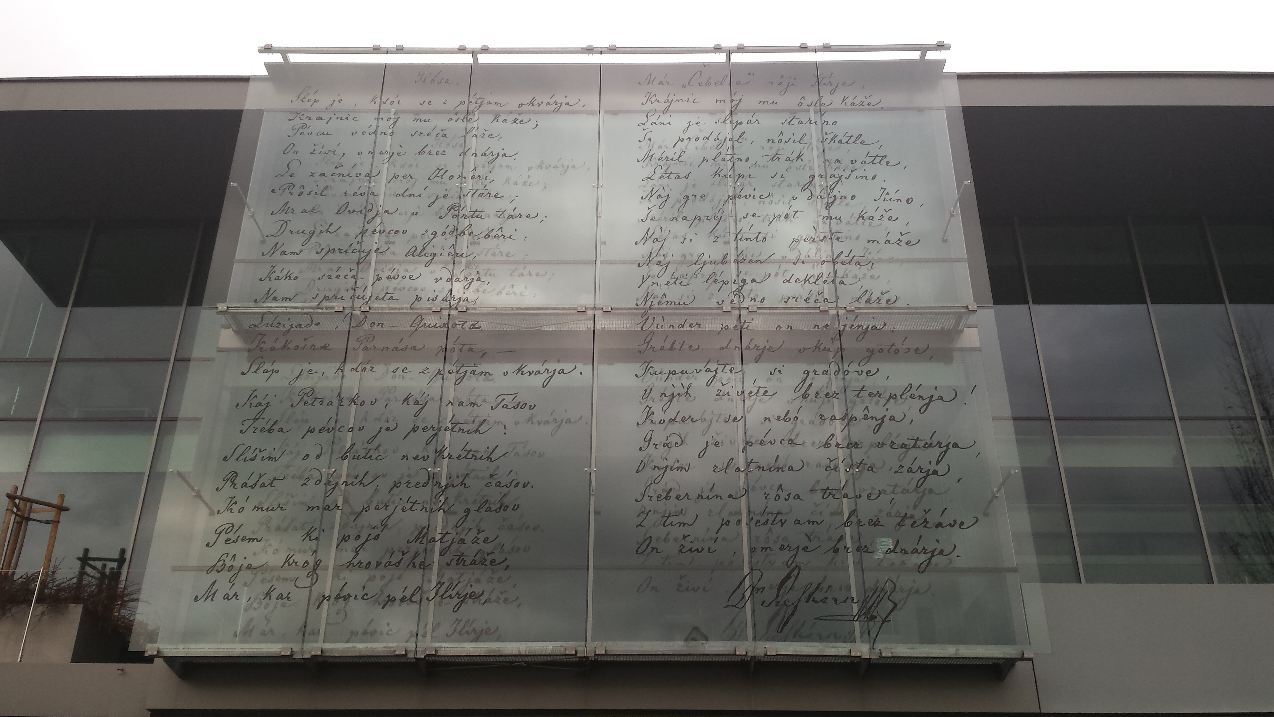 Mestna knjižnica Kranj; Glosa na fasadi objekta Globus, kjer je knjižnica.